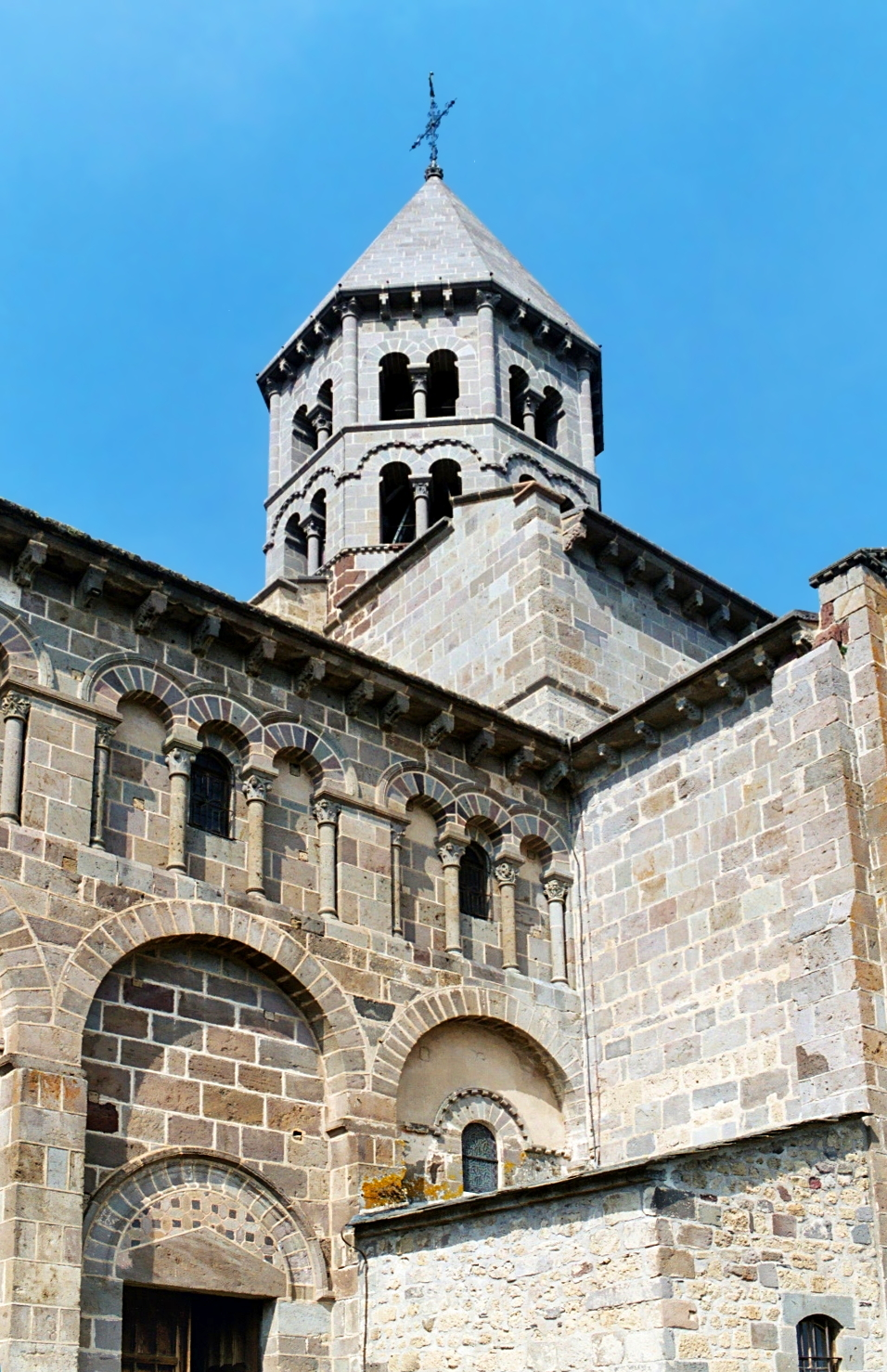 France - Auvergne - Puy-de-Dôme - Église de Saint-Nectaire